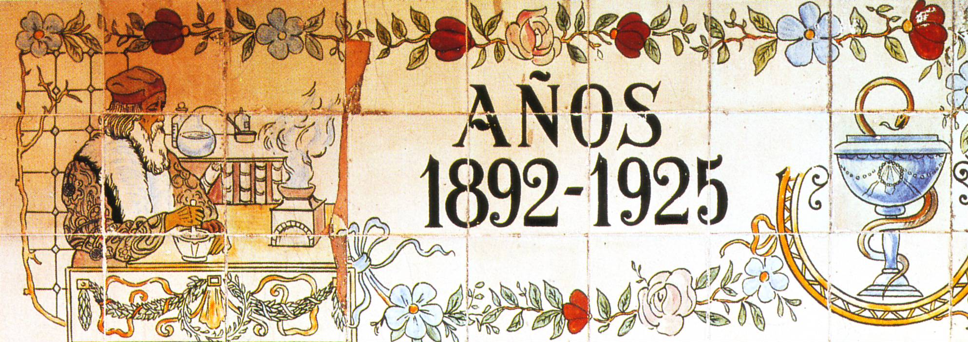 Cartel de la Farmacia y Laboratorios Juanse en Madrid (1892-1925)